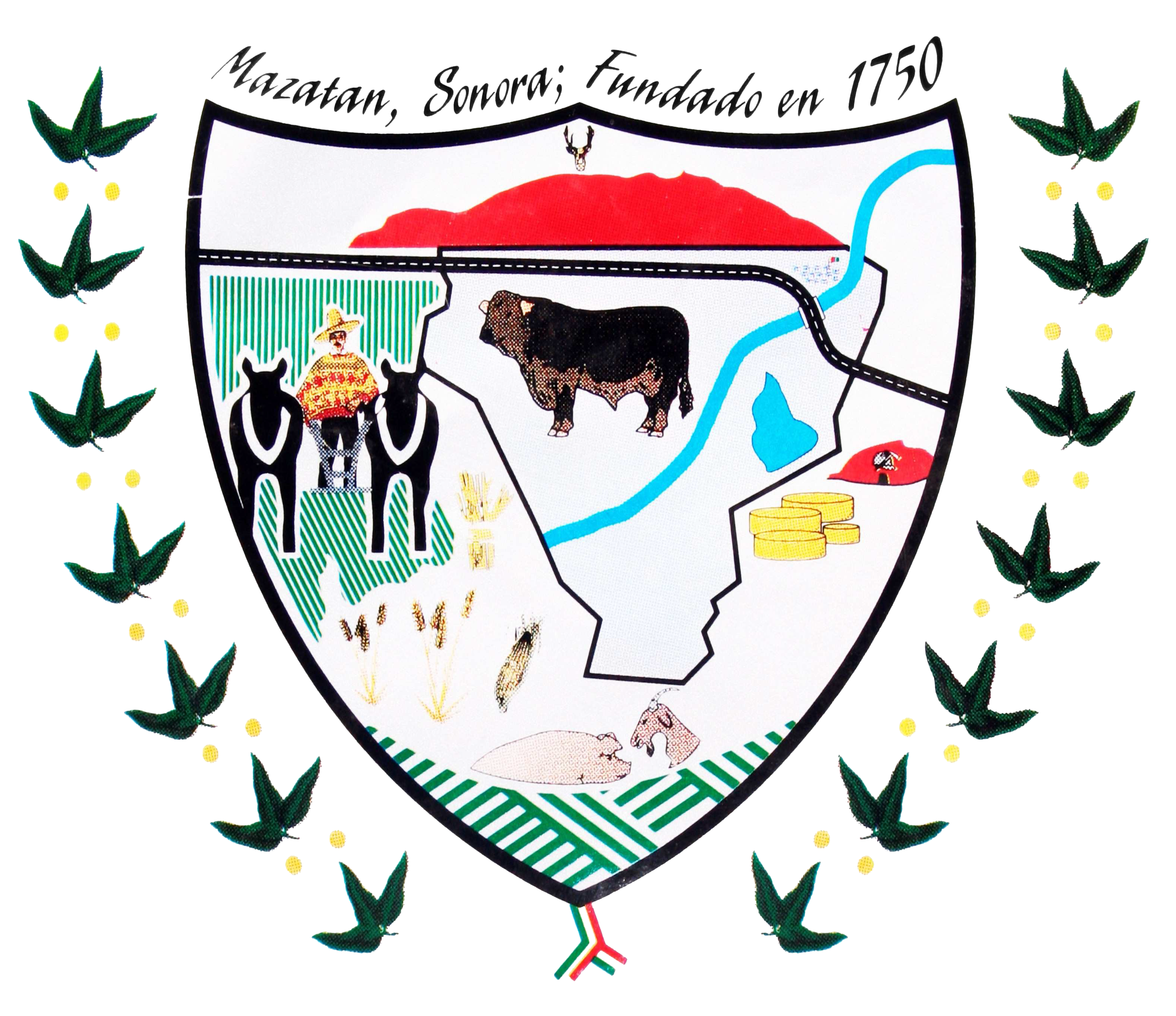 Escudo del municipio sonorense.